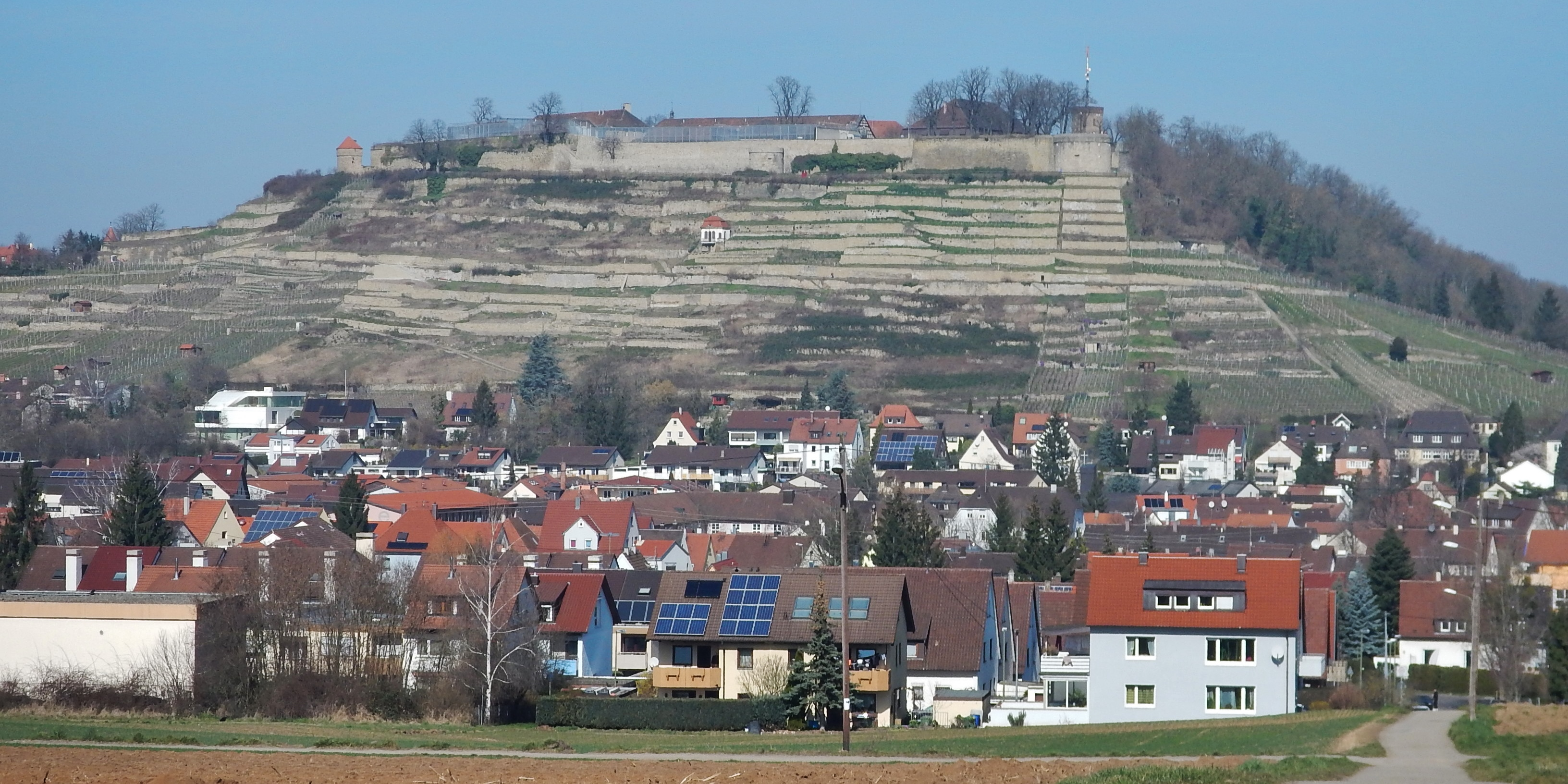 Blick über Asperg zum Hohenasperg